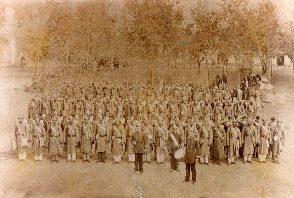 6°Compañía Regimiento Chacabuco Regimiento 6° de Línea "Chacabuco"